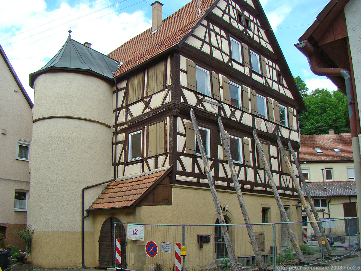 Ehem. Gemmingensches Amtshaus in Widdern